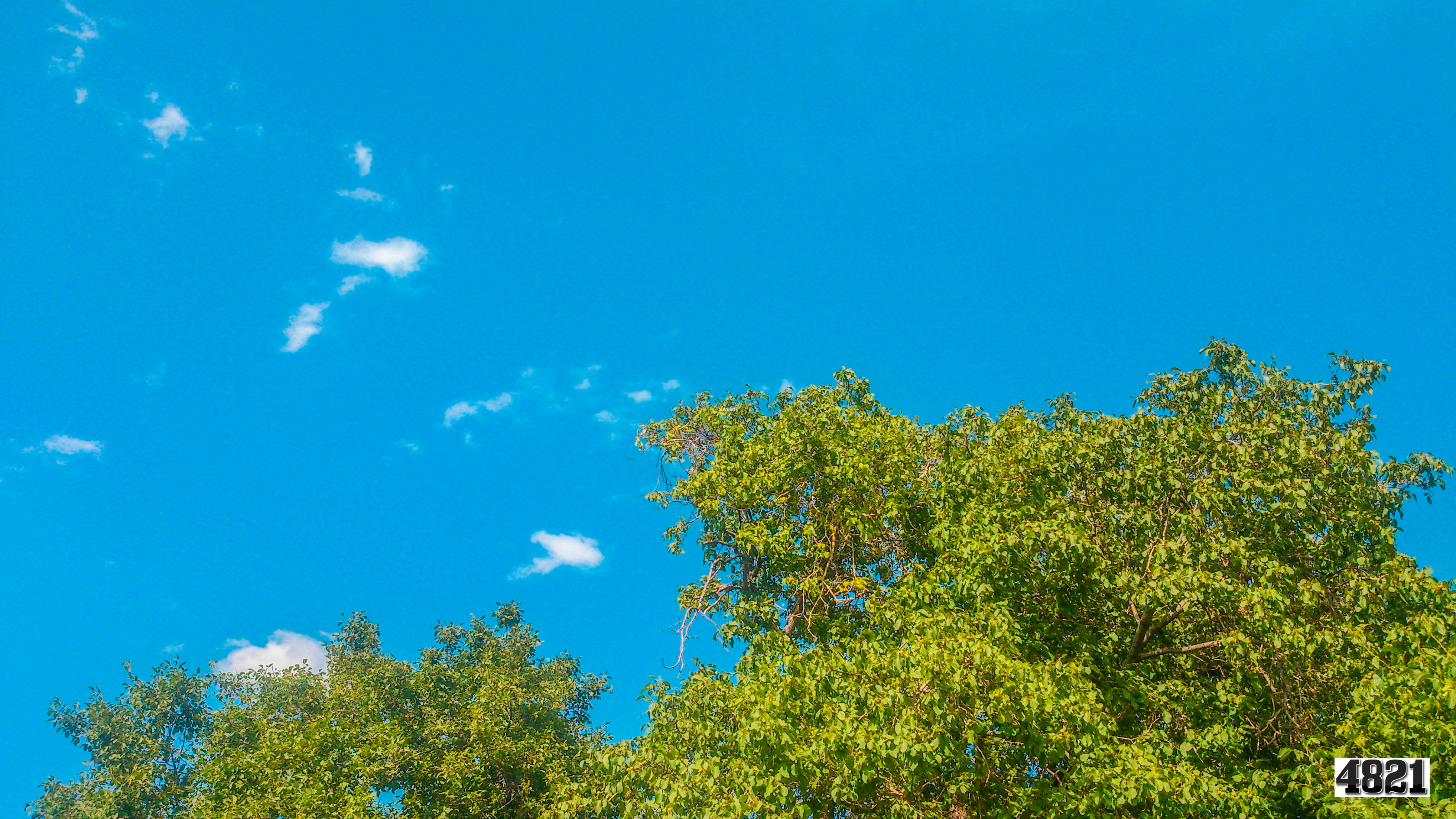 A nice day in Ordubad, Azerbaijian.